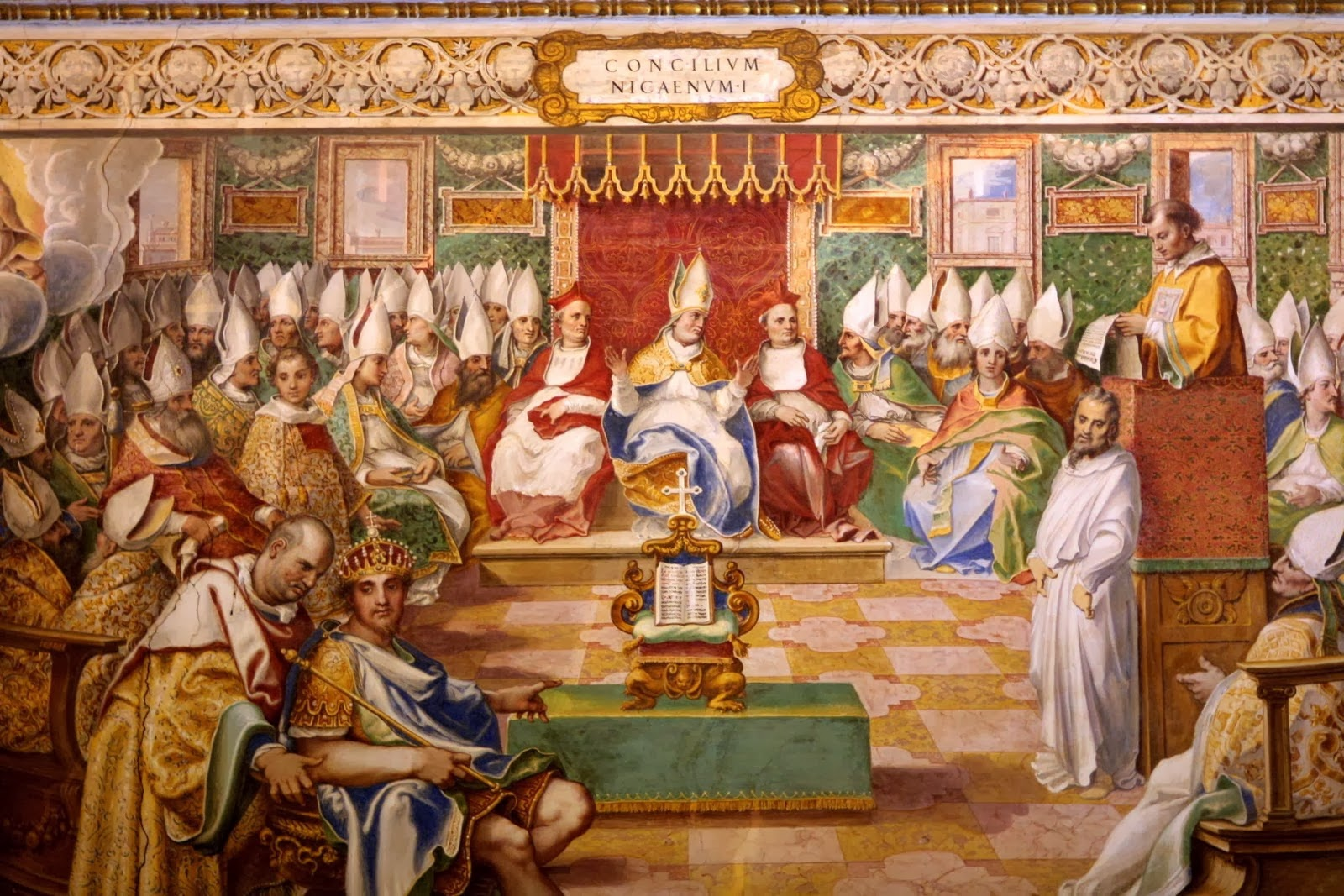 Ouverture du Concile de Nicée (325) par l'Empereur Constantin Ier le Grand (premier plan).